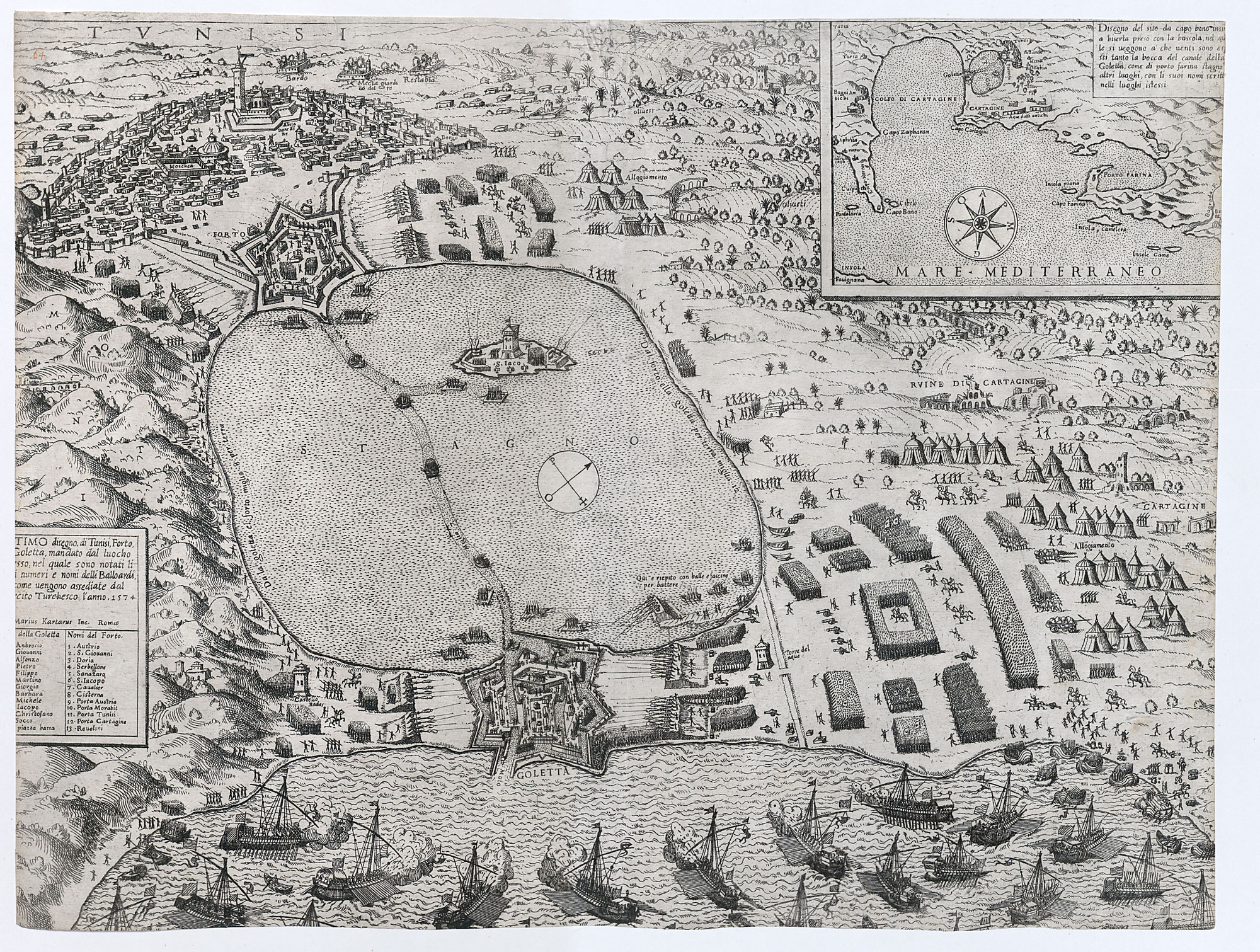 Cartaro, Mario: ...timo disegno di Tunisi ...; Kupferstich, 1574